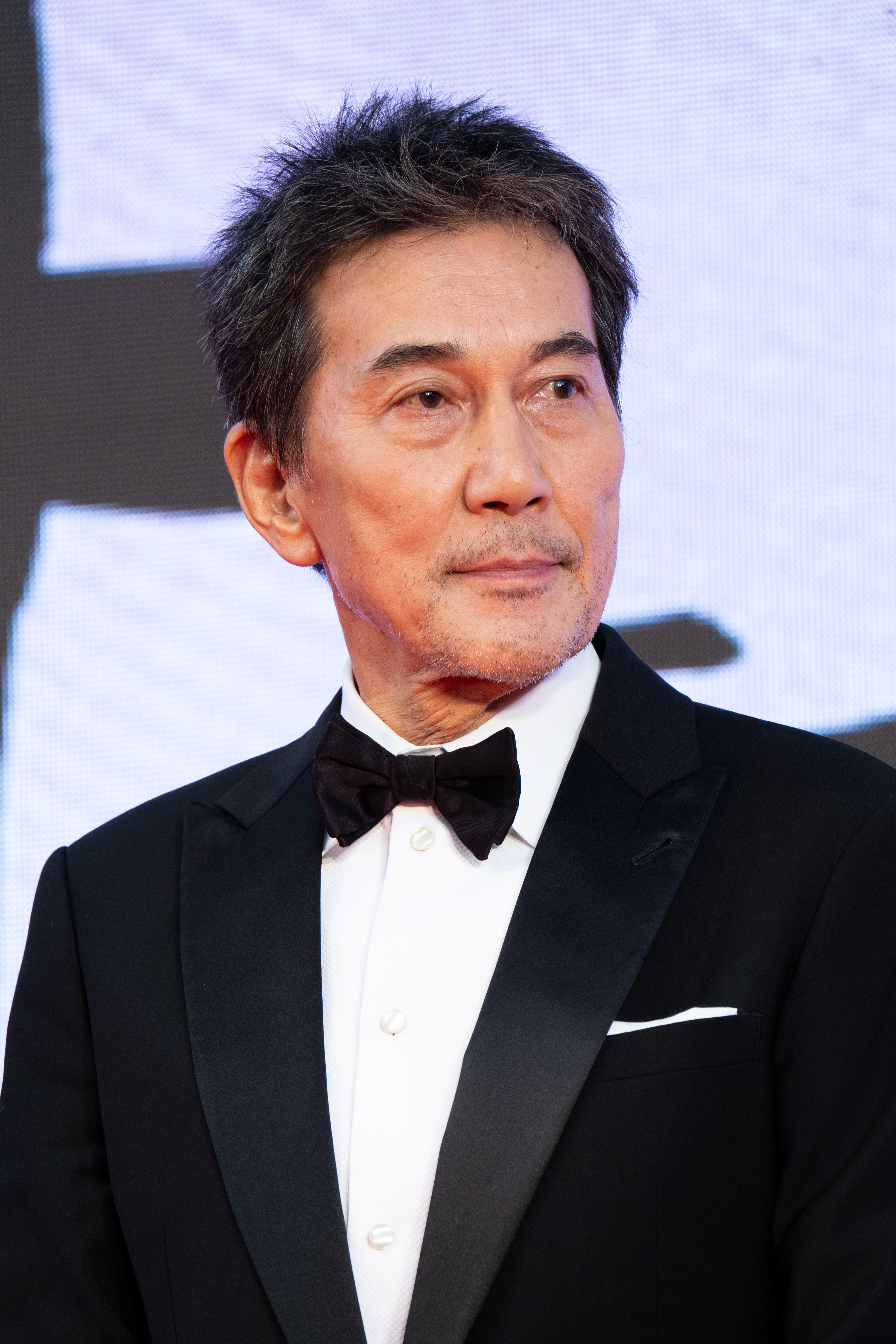 第32回 東京国際映画祭 オープニングセレモニー 役所広司 (オーバー・エベレスト 陰謀の氷壁)